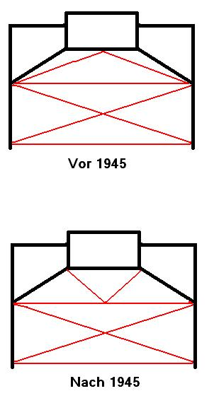 Paint-erstellte Erläuterung des veränderten Chorabschlusses der Cossfelder Jesuitenkirche nach 1945 im Vergleich zu dem, wie er einer Vorkriegsbeschreibung (Zitat: "Halbes Kreuzgewölbe") und alten Fotografien nach gewesen ist.